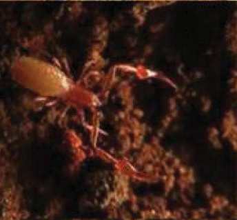 Figure 2; Ideoroncus cavicola